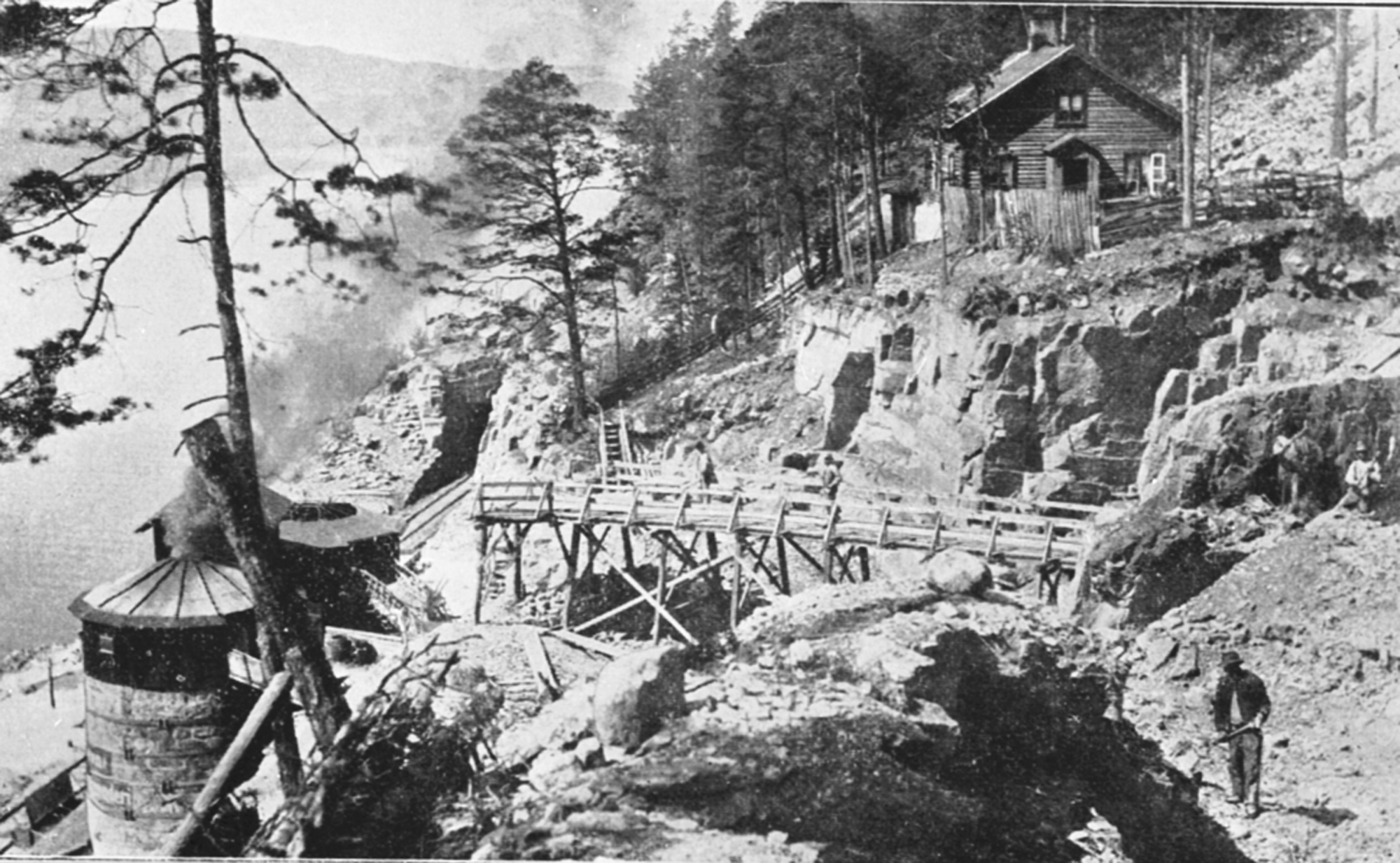 Steinbrudd, Steens kalkbrenneri Furuberget, Hamar, ca. 1900-1907